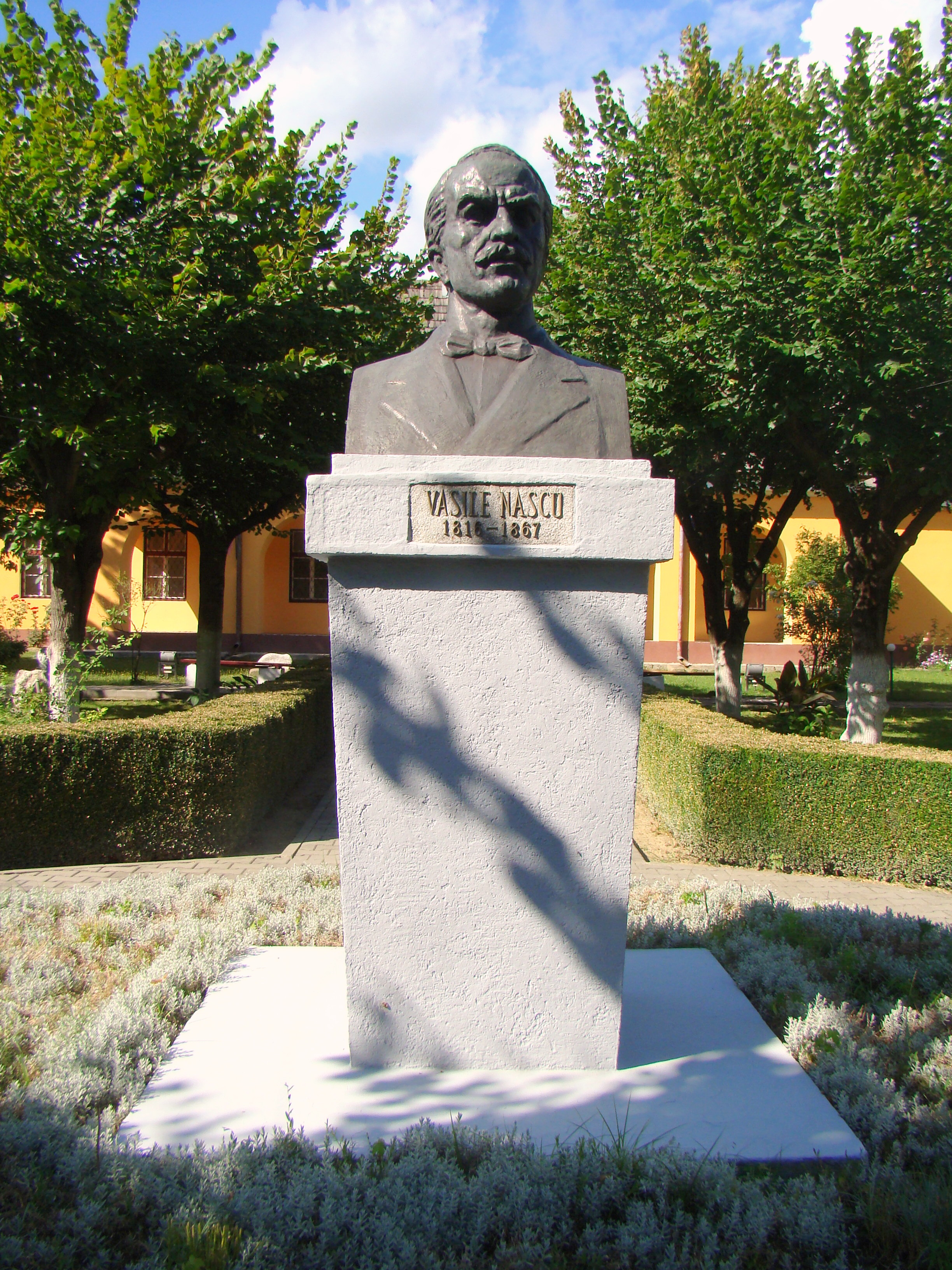 Bustul lui Vasile Nașcu, oraș Năsăud,Str. Grănicerilor 19, în curtea Muzeului Grăniceresc Năsăudean